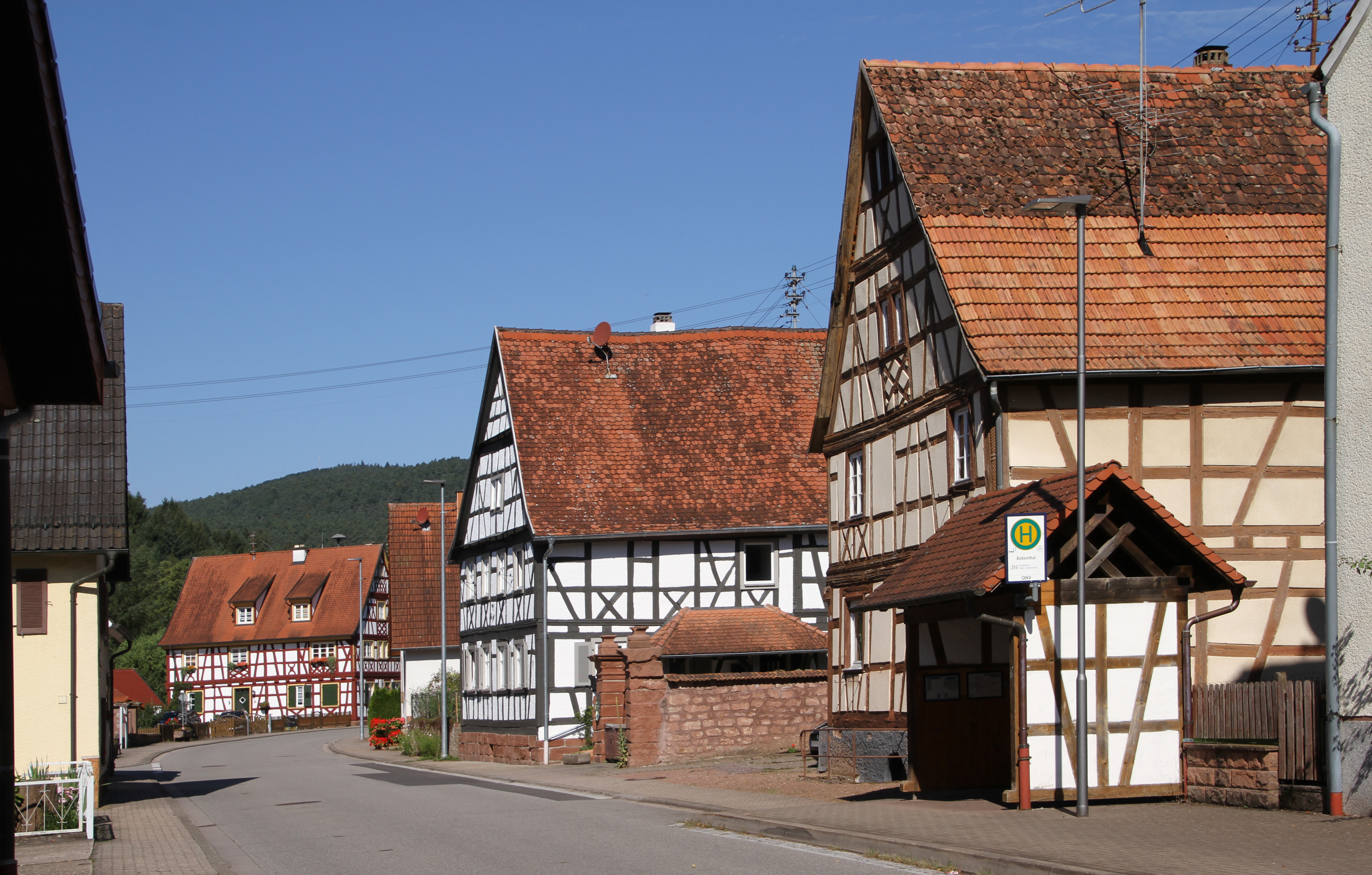 Bobenthal, Hauptstraße 14 (links am Ende der Straße); Fachwerkhaus von Theobalt und Ursula Kling; bezeichnet 1731. Hauptstraße 7 (Mitte); Fachwerkhaus, 1726 und 1763. Hauptstraße 9 (rechts); Fachwerkhaus, teilweise massiv, wohl aus der ersten Hälfte des 18. Jahrhunderts.